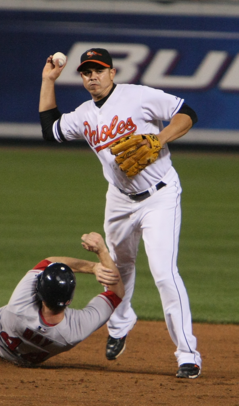 Alex Cintrón